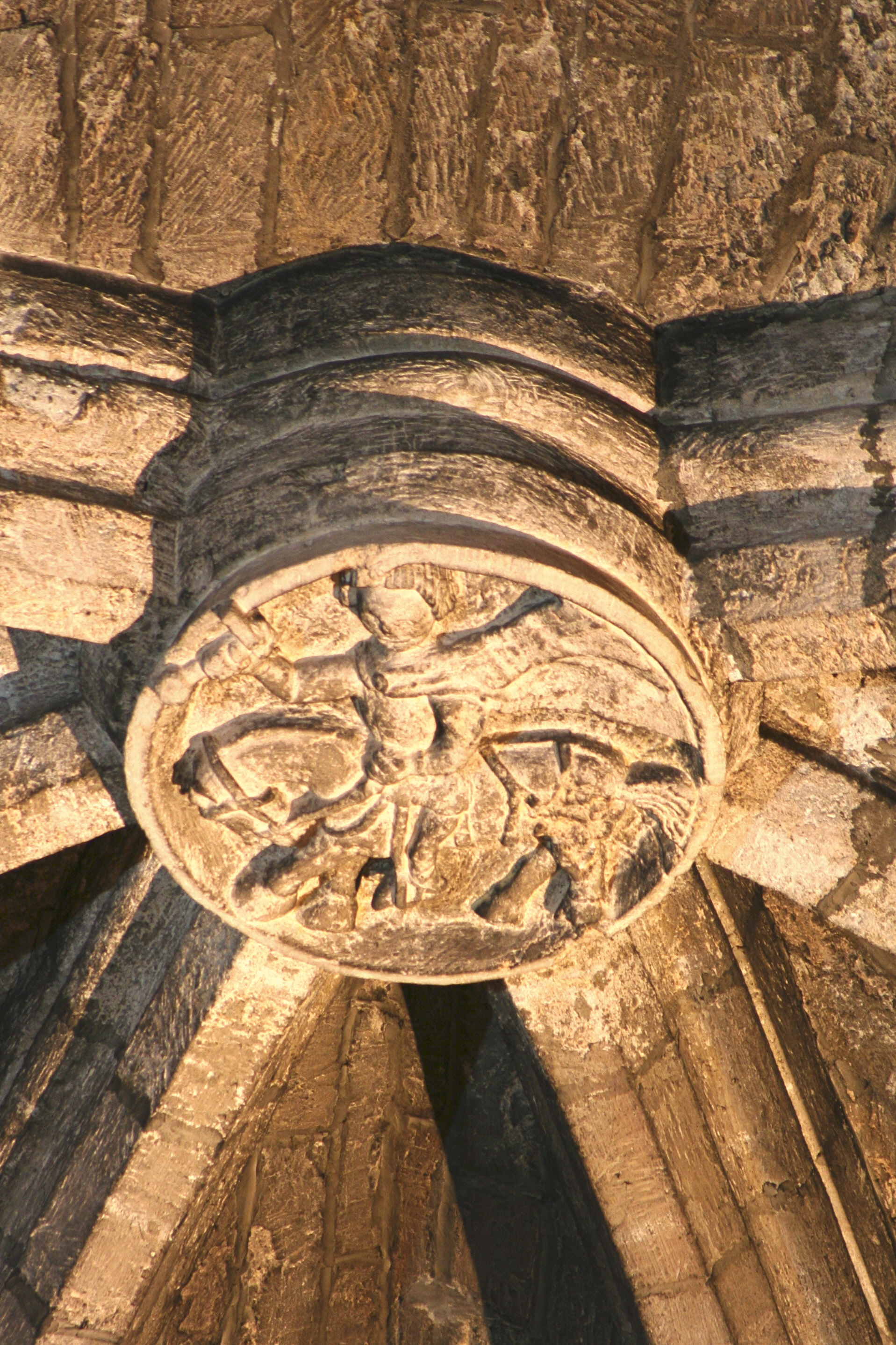 Clef de voute du choeur de l'abbaye de Saint-Victor à Marseille représentant Saint-Victor en chevalier. Fin XIVe siècle.